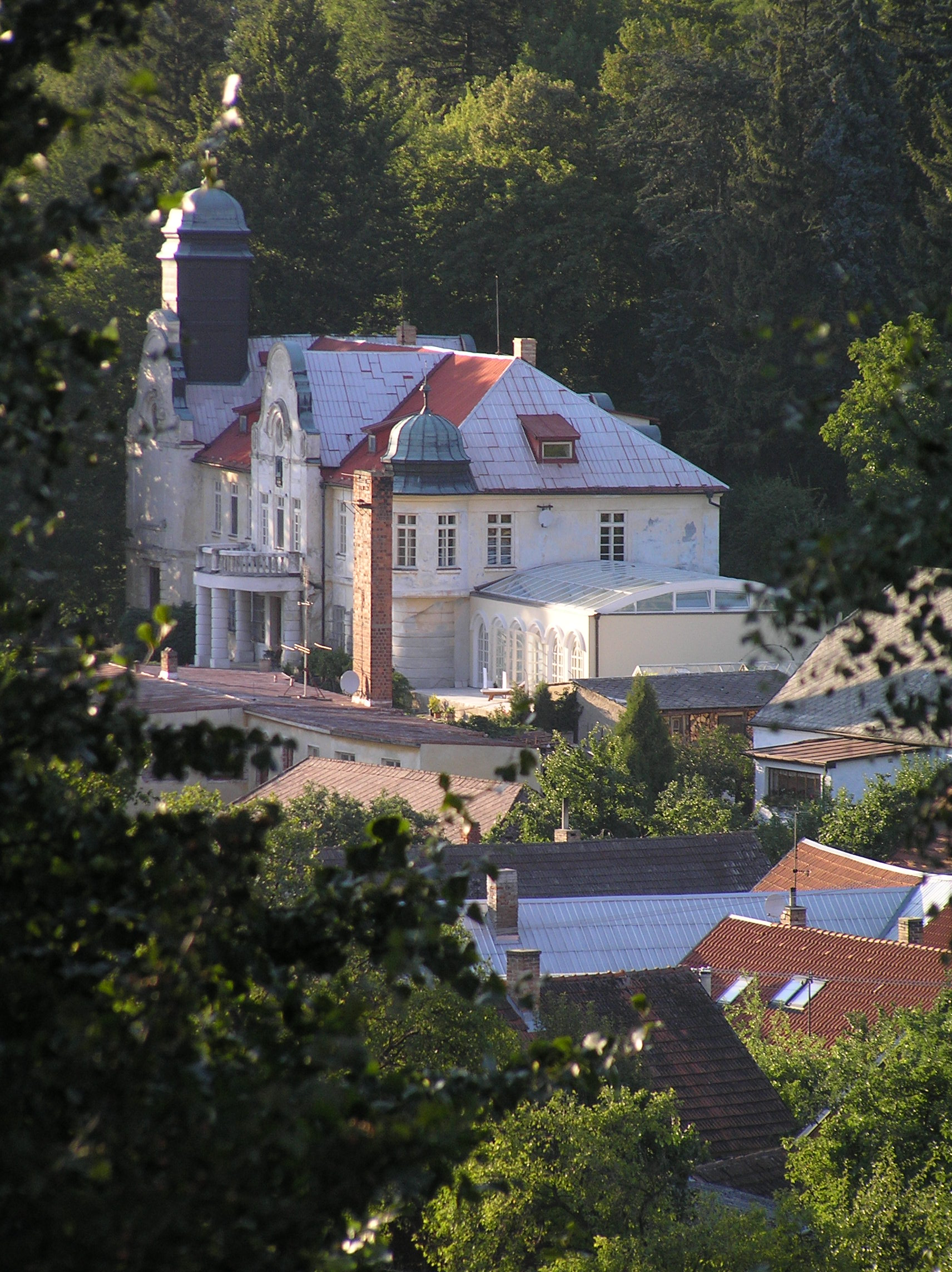 Zámek Radvanov, Radvanov 1, Radvanov (Mladá Vožice).